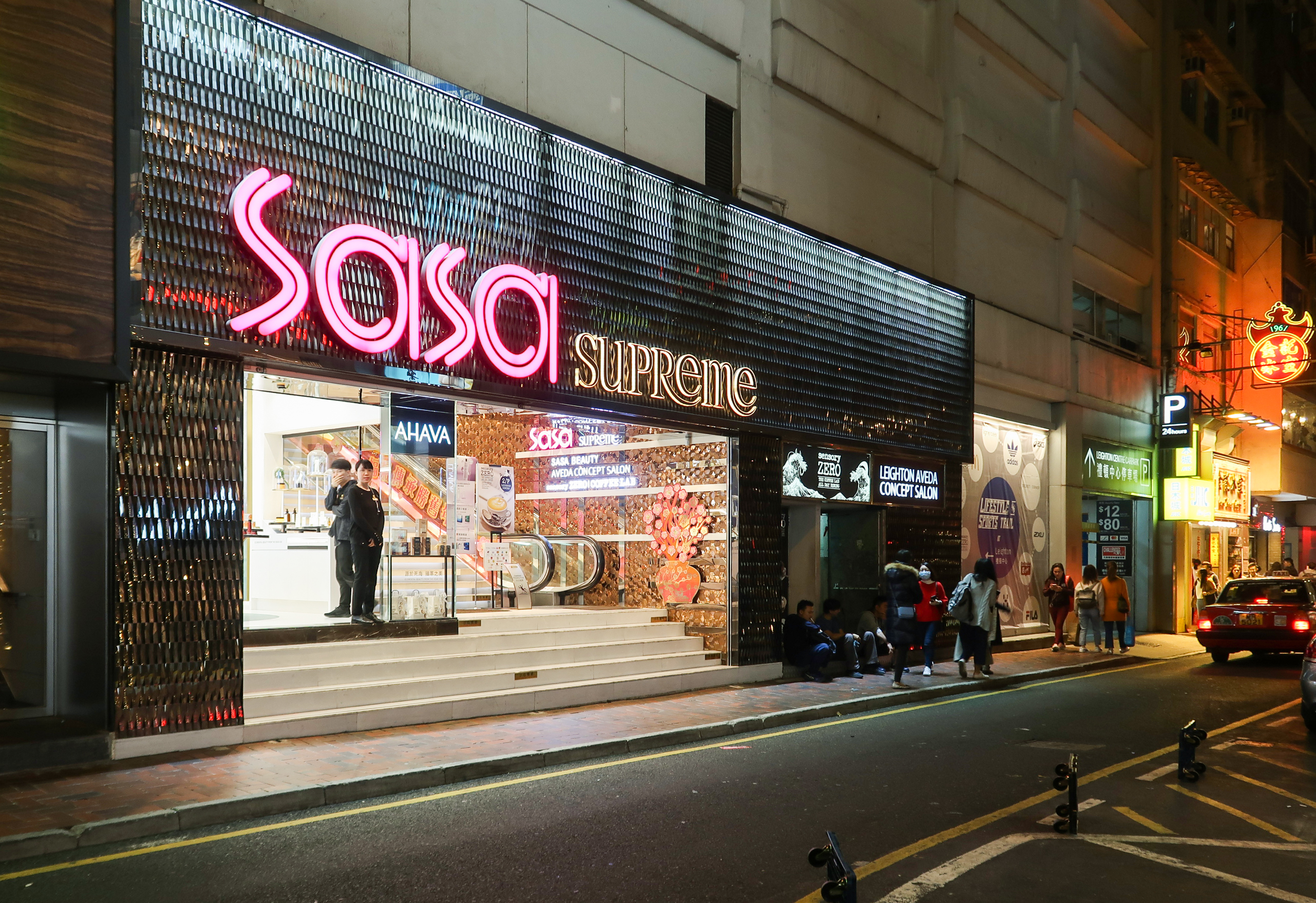 SASA Supreme